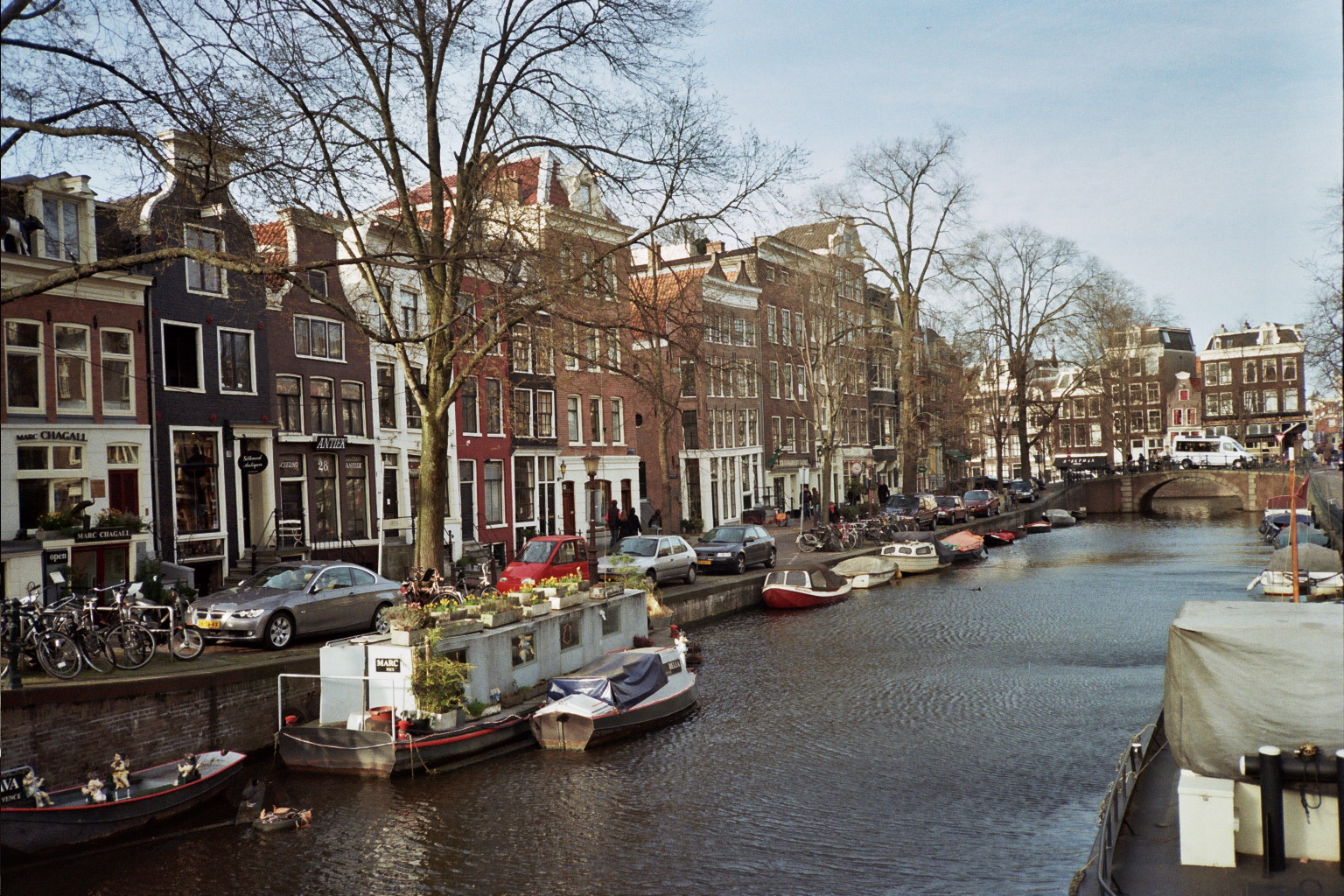 Spiegelgracht in Amsterdam. In the background: Bridge 87 (Spiegelbrug). This is an image of rijksmonument number 5509 This is an image of rijksmonument number 5510